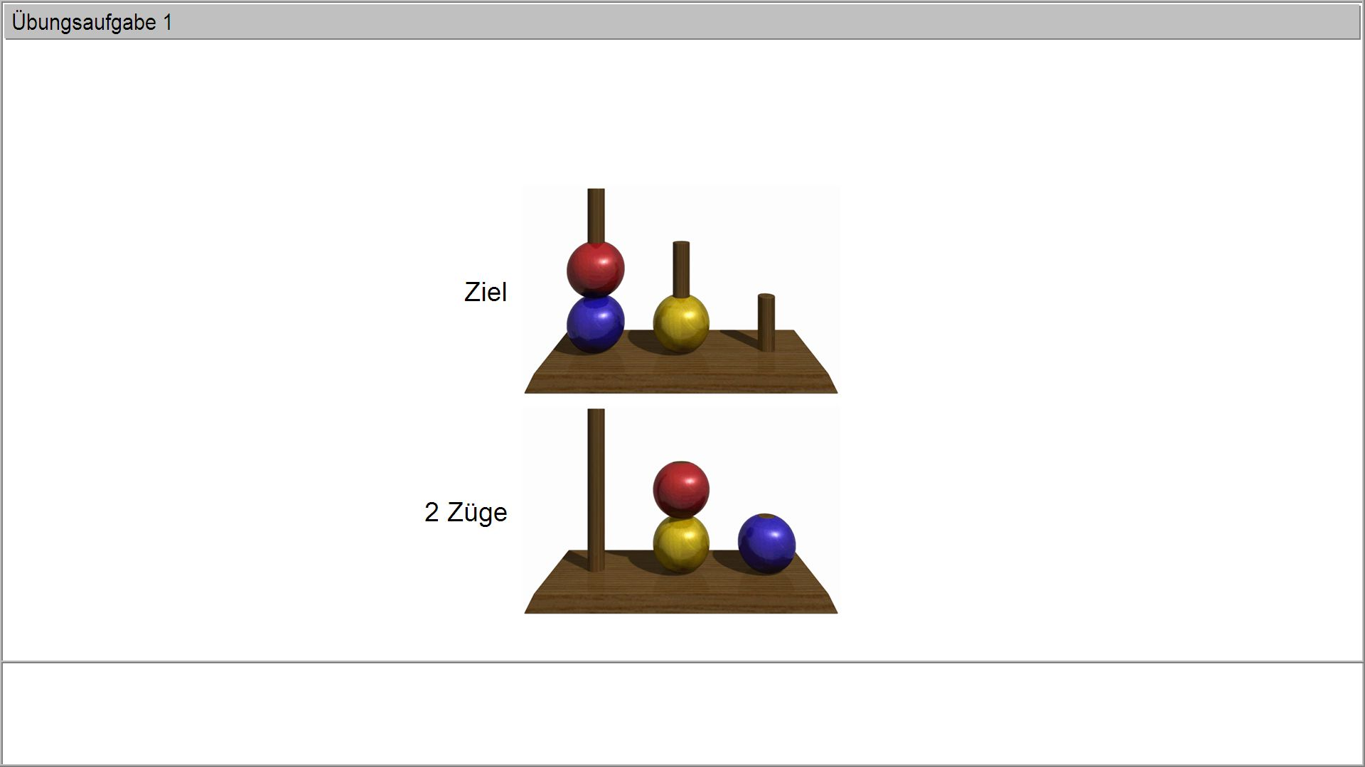 TOL Screenshot